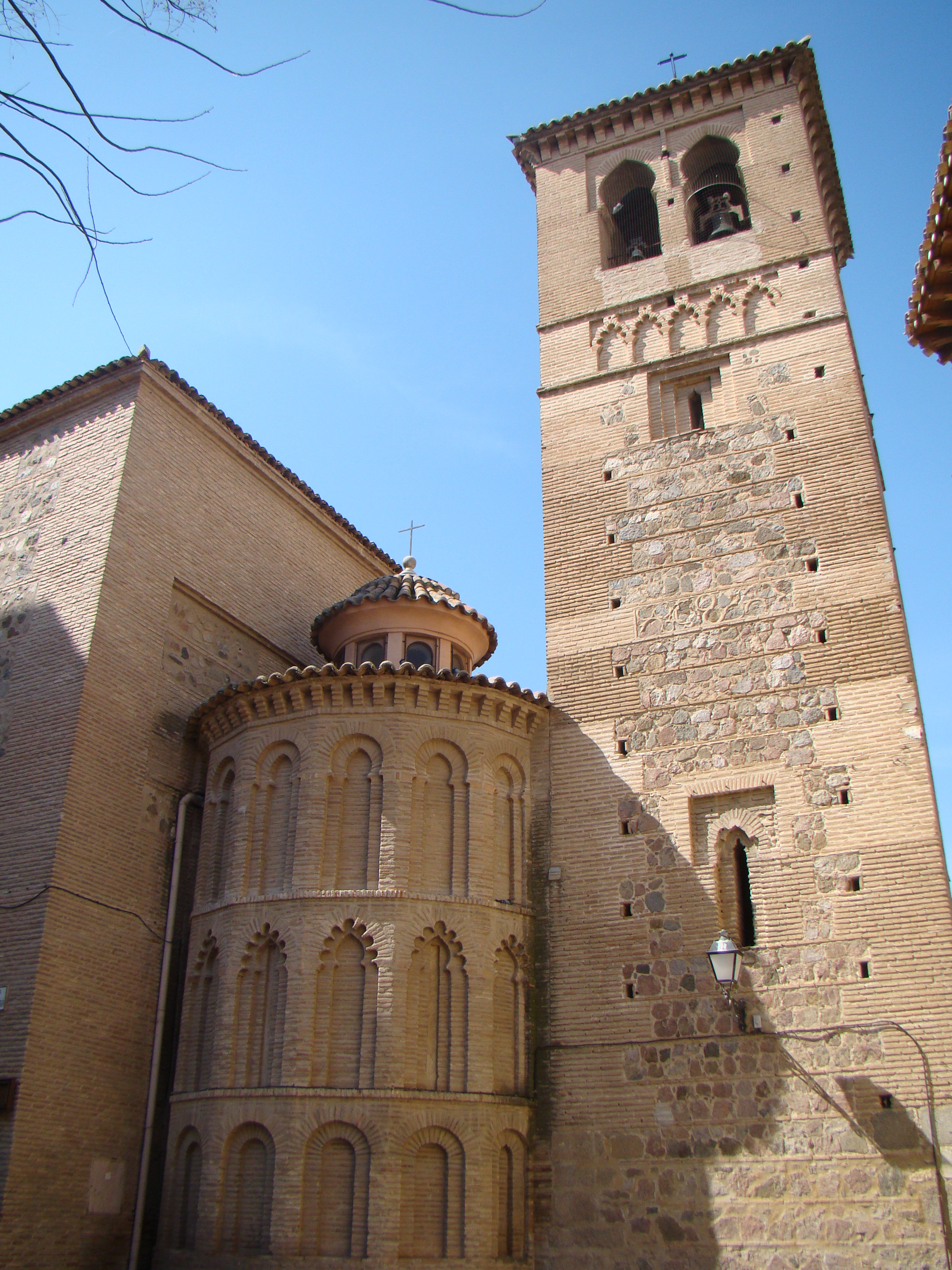 Convento de Santo Domingo El Antiguo